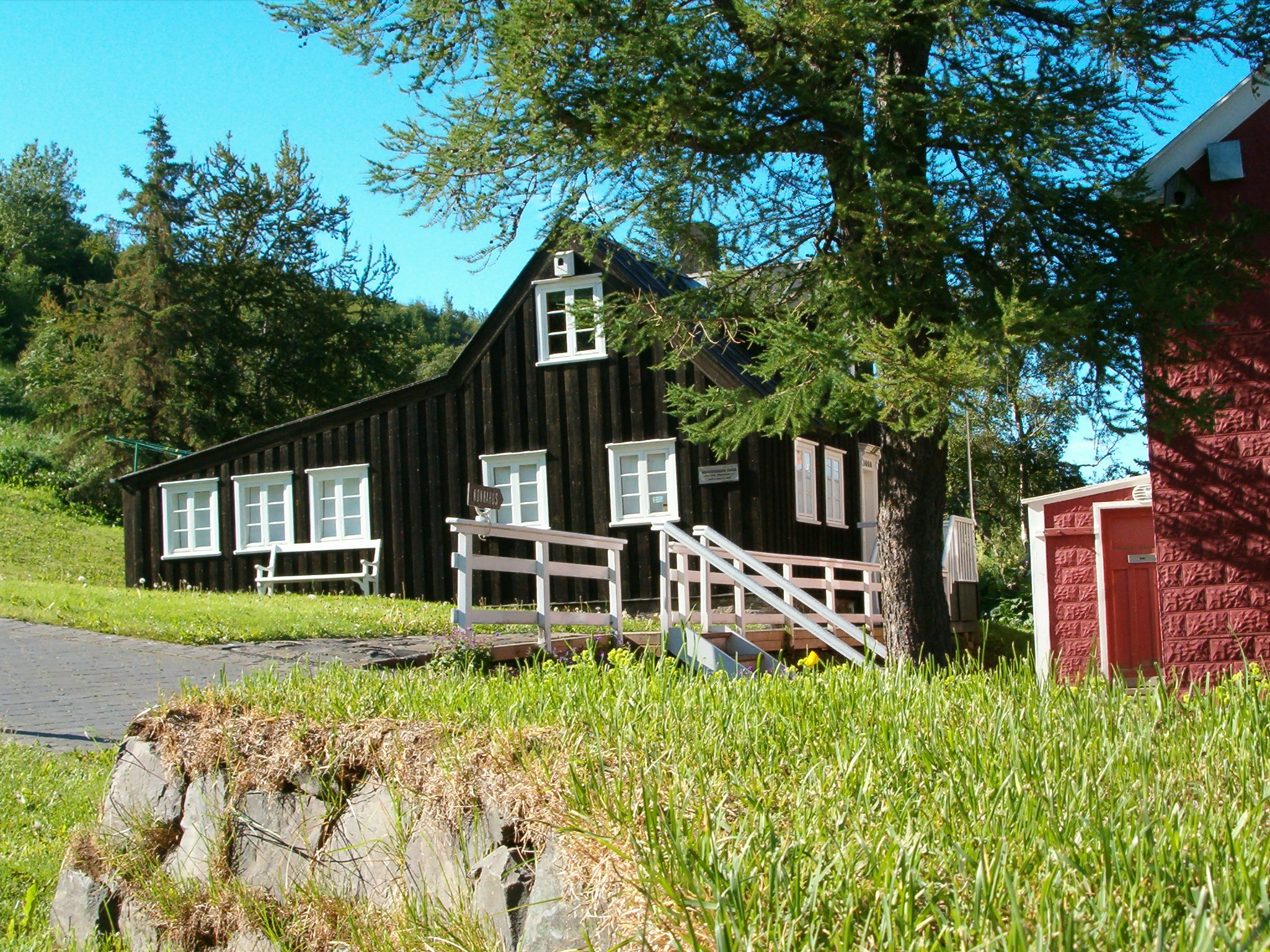 Nonnahús